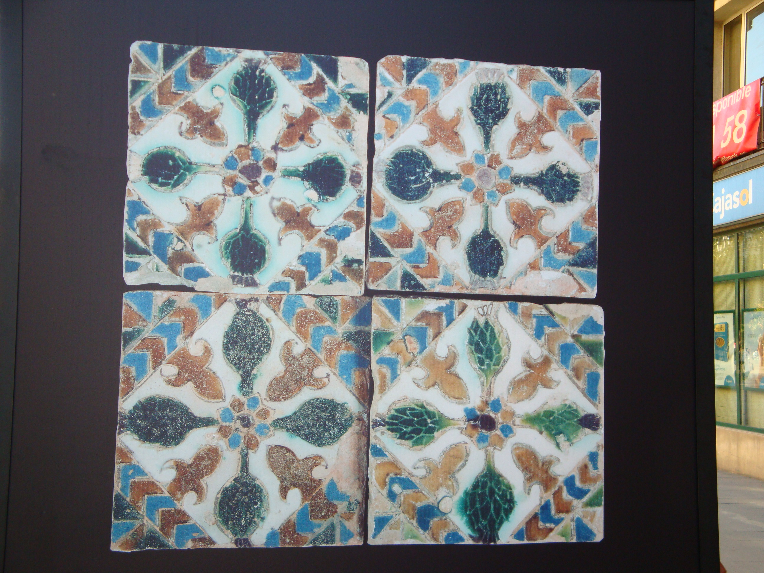 Azulejos sevillanos. Colección Miguel Ángel Carranza